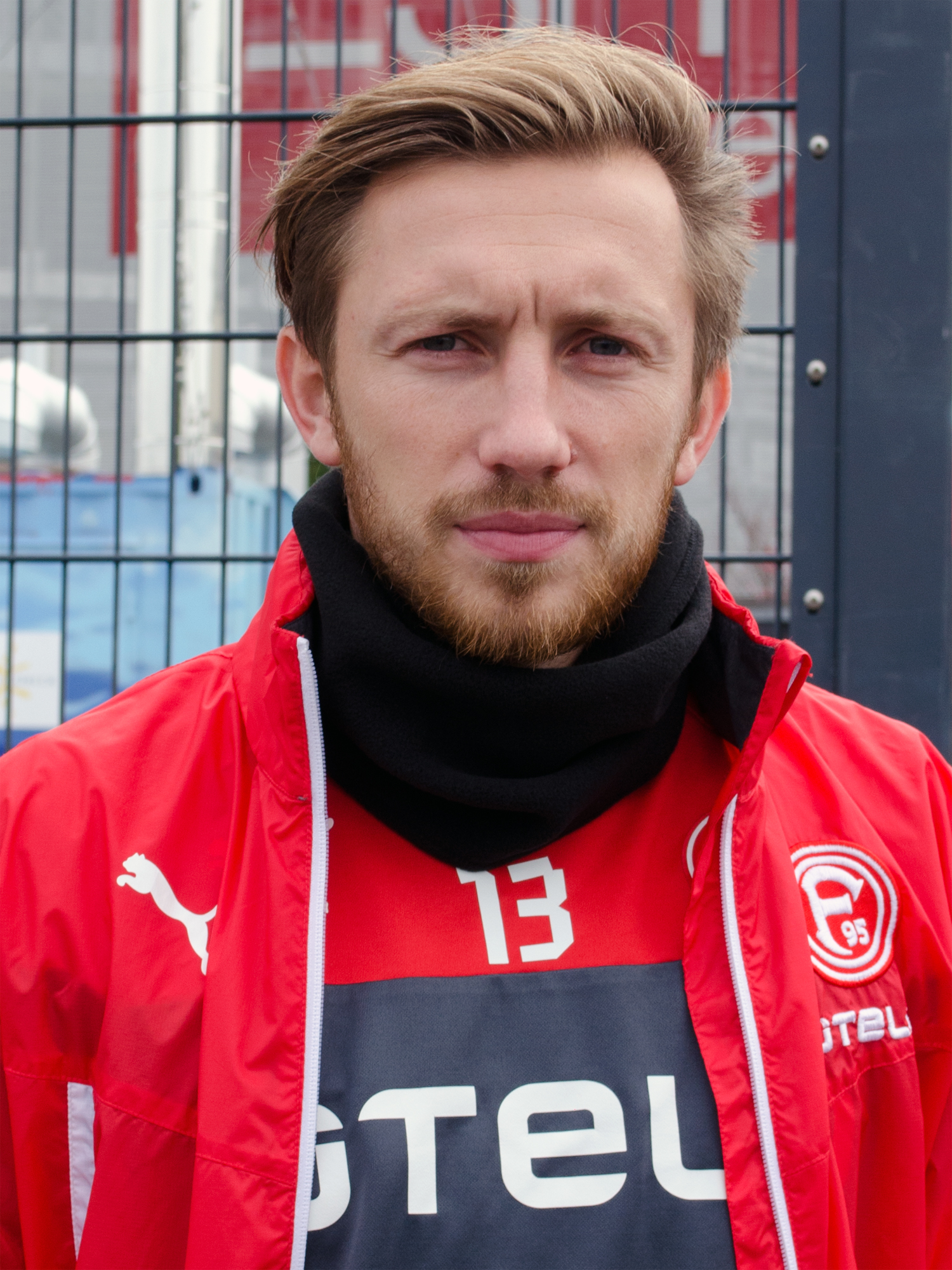 Adam Bodzek, deutscher Fußballspieler